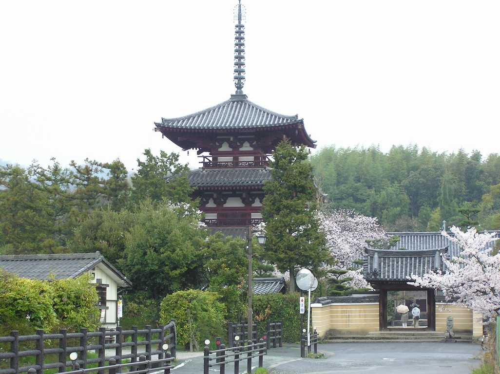 Horin-ji, Ikaruga, Nara